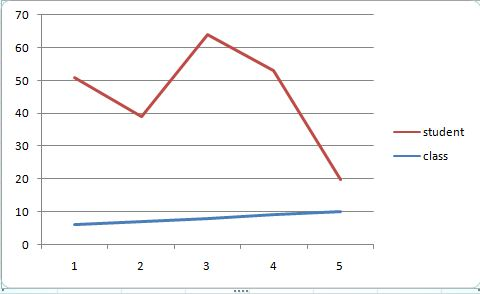 नेपाली: रेखाचित्र